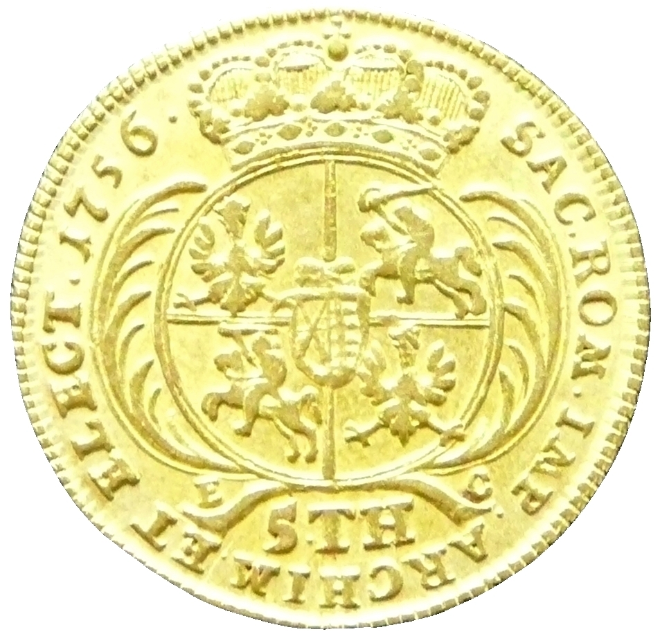 August d’or (5 Taler) 1756 August III. König von Polen (1733-1763) Wert = 5 Taler = 30 polnische Gulden Münzstätte Leipzig Prägung 1753-1756 Münzmeister Ernst Dietrich Croll im Amt 1753-1757 Münzfuß: 35 Stück auf die rauhe Mark Gold 21 Karat 8 Grän fein = 902,778‰ Feingewicht = 6,032 g Gewicht 6,682 g Ist-Gewicht: 6,64 g Durchmesser: 23,10-23,63 mm Dicke: 1,08 mm unter der Königkrone zwischen zwei Palmenwedel rundes vierfeldriges Wappen von Polen (Adler) und Litauen (Reiter) und dem hochgeteilten kursächsisches Wappen im Herzschild mit Kurhut; zwischen den Palmenstielen Wertangabe: 5.TH links und rechts der Palmenstiele das geteilte Münzmeisterzeichen: E C Fortsetzung der Titelumschrift von oben rechts beginnend: SACRI ROMANI IMPERII ARCHIMARSCHALLUS ET ELECTOR